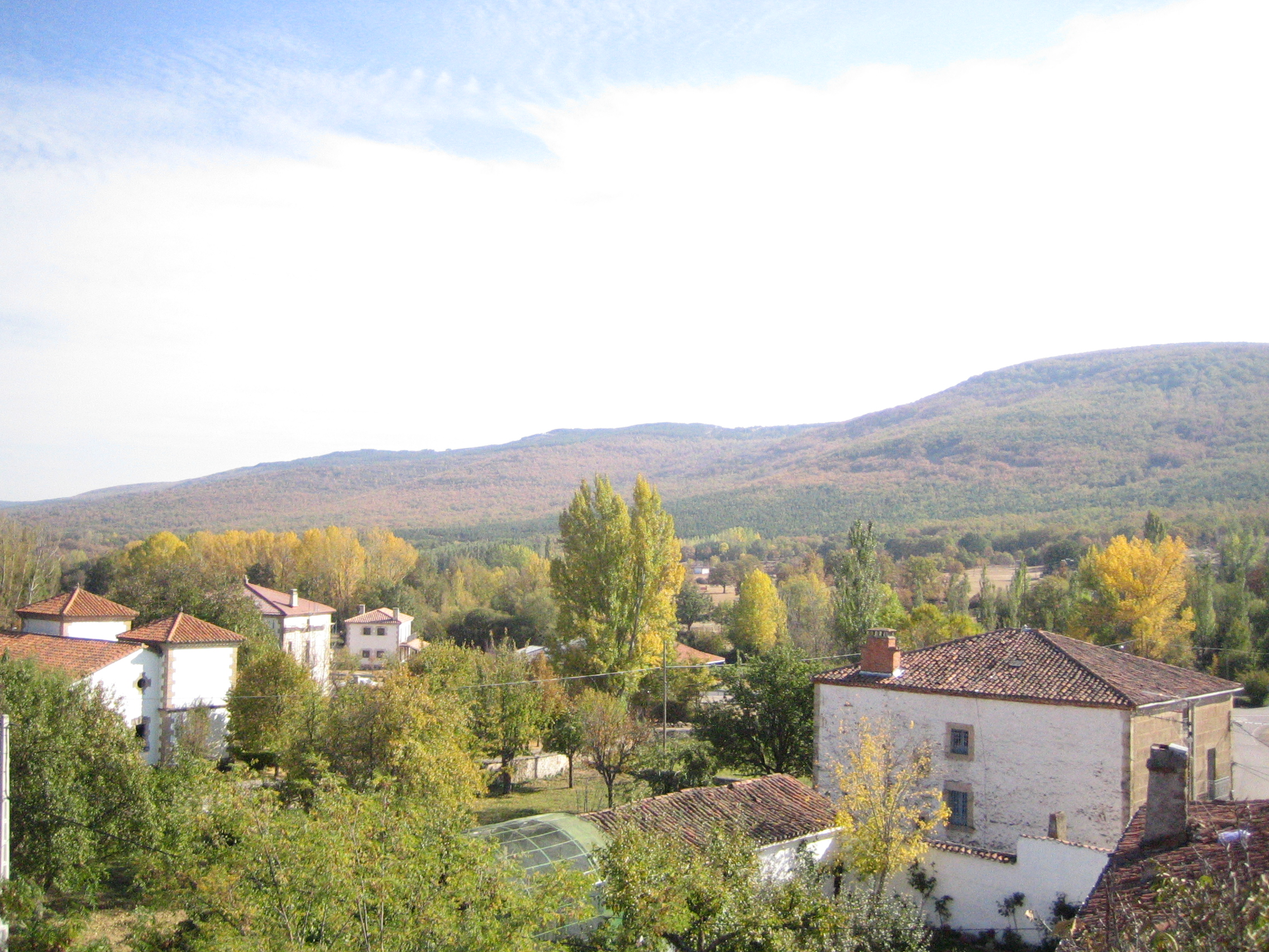 Vista de Sotillo del Rincón